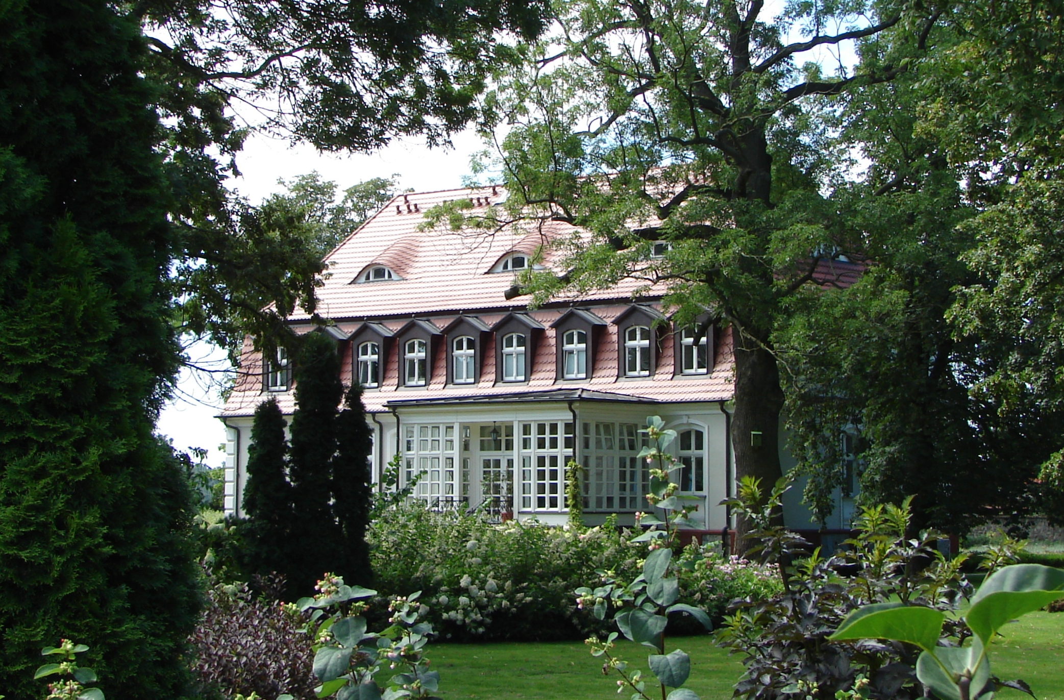 Puszczykowo-Zaborze, Gmina Swarzędz, dwór